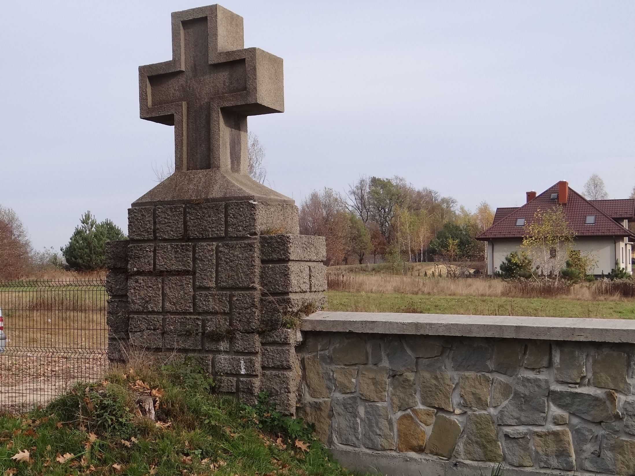 World War I Cemetery nr 273 in Szczepanów Cmentarz wojenny nr 273 - Szczepanów